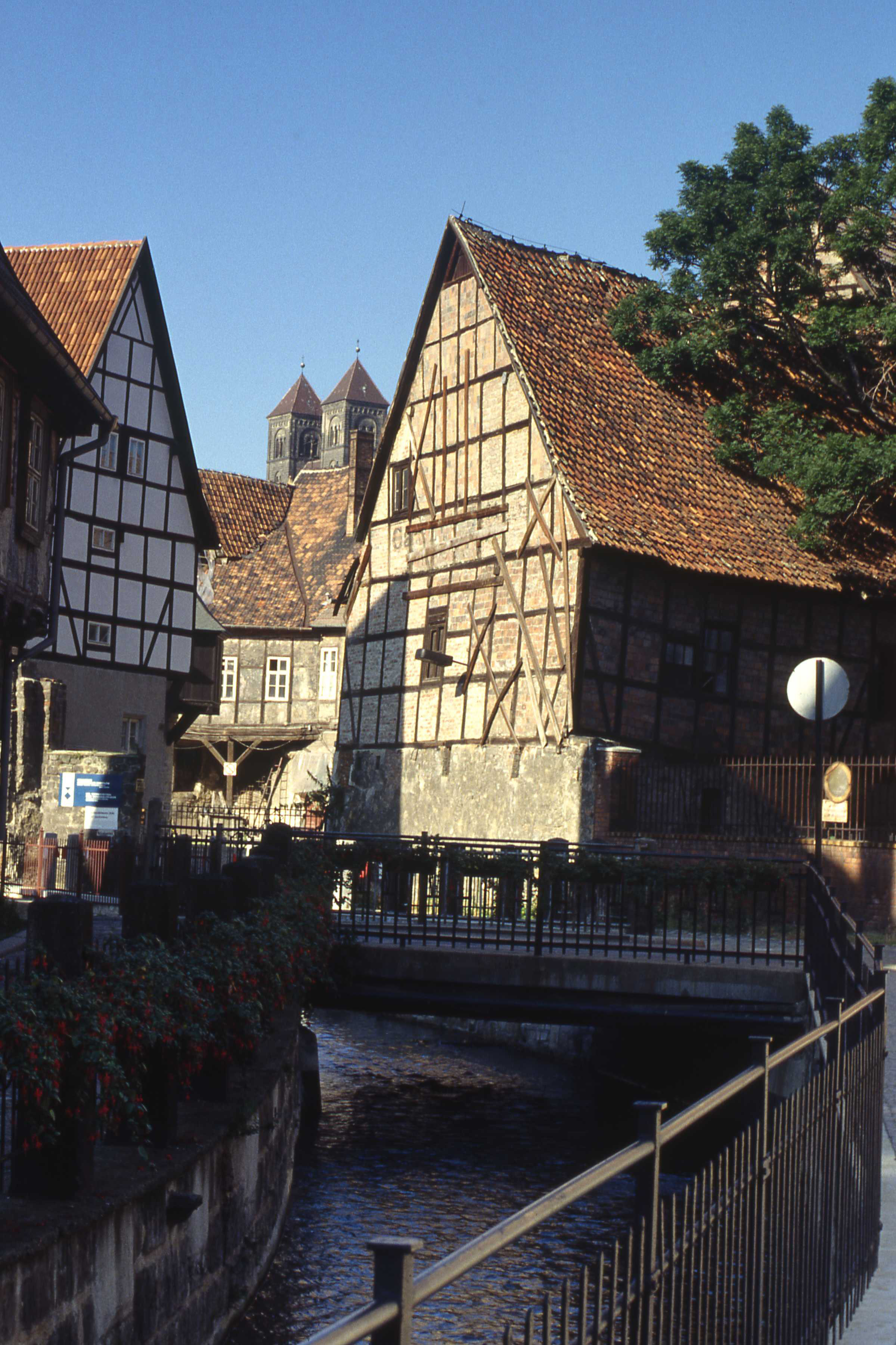 Quedlinburg, Stadje in de Hartz